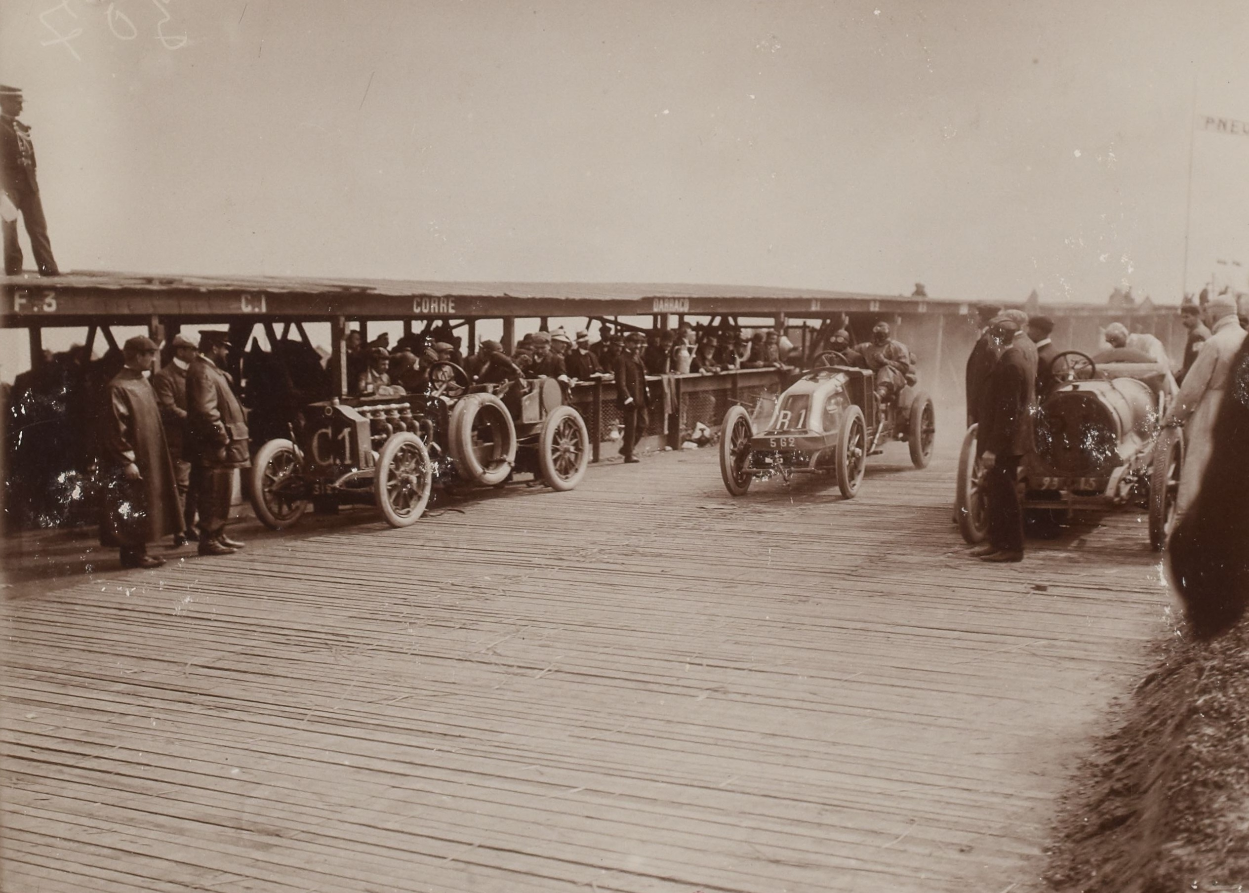 [Collection Jules Beau. Photographie sportive] : T. 34. AnnÃ©es 1907 et 1908 / Jules Beau : F. 6. [Grand Prix de l\' A. C. F. [Automobile Club de France], Coupe de la Commission sportive, 2 juillet 1907]